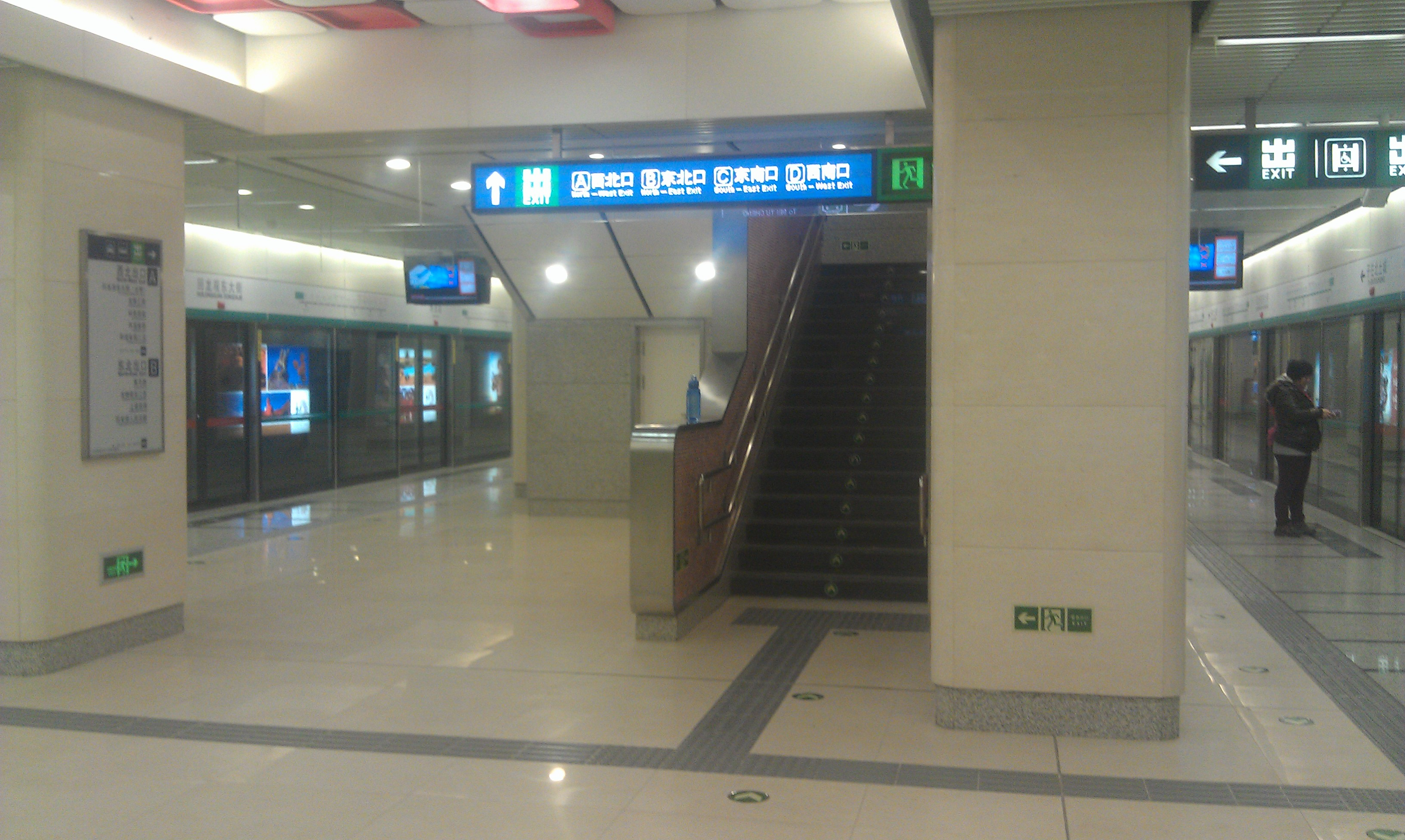 北京地铁回龙观东大街站站台